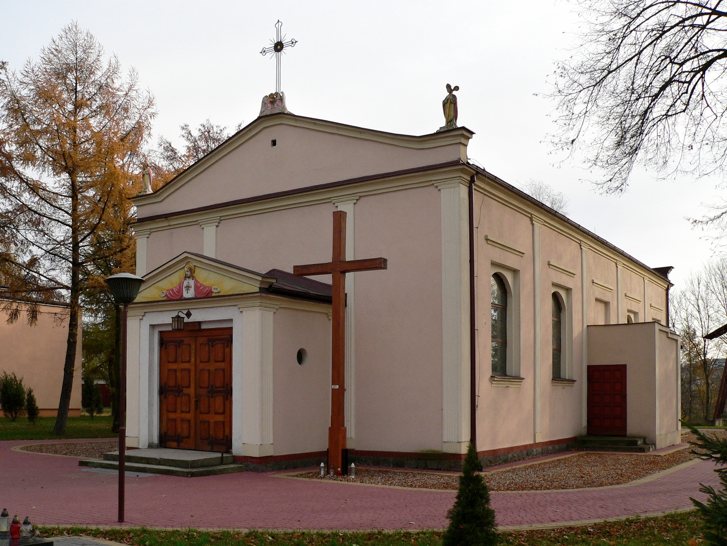 Kościół św. Stanisława Biskupa i Męczennika w Lubiczu Dolnym, woj. kujawsko-pomorskie.